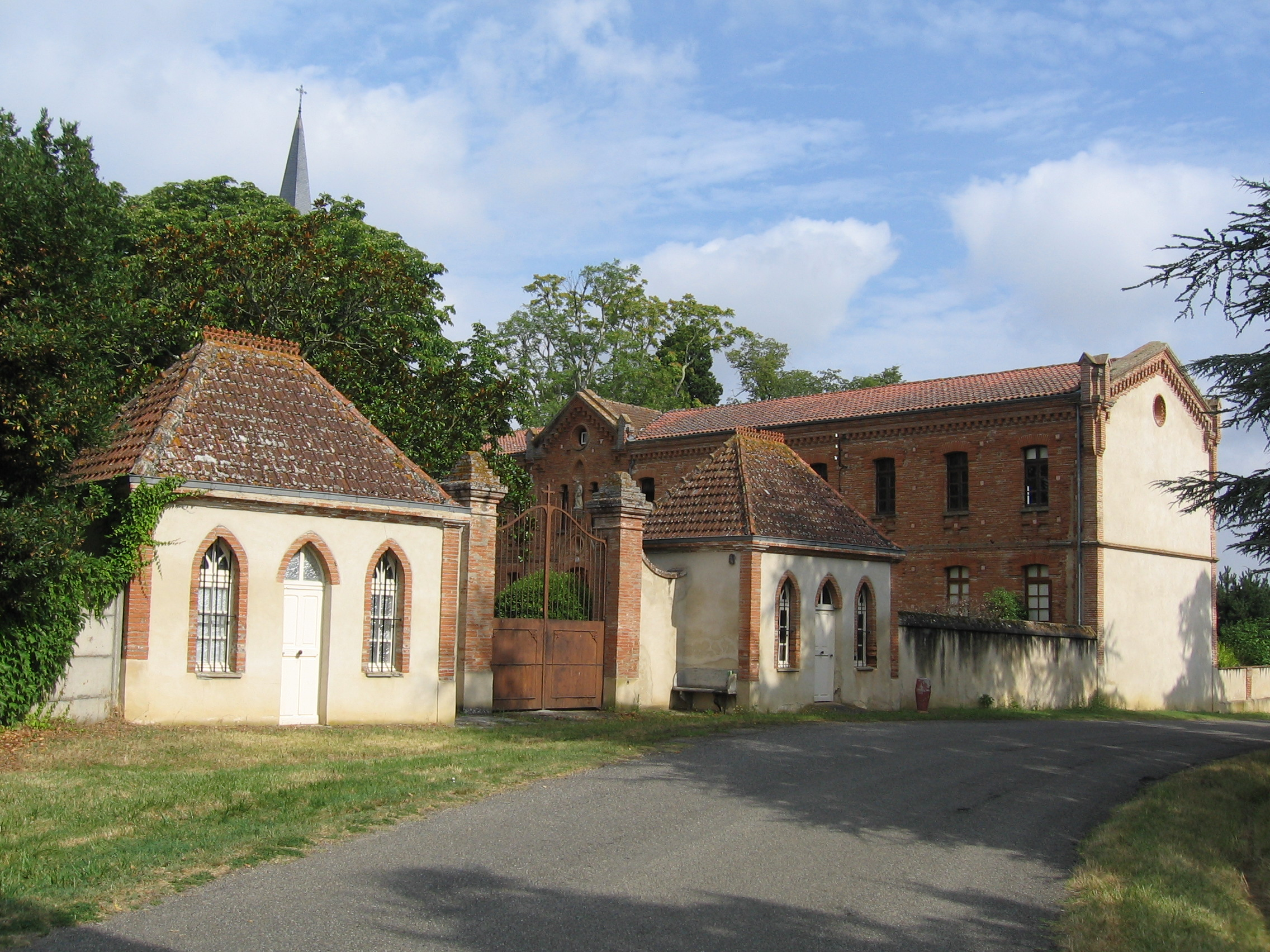 Portail de l'ancienne entrée de l'abbaye cistercienne Sainte-Marie du désert, à Bellegarde-sainte-Marie en Haute-Garonne (France)